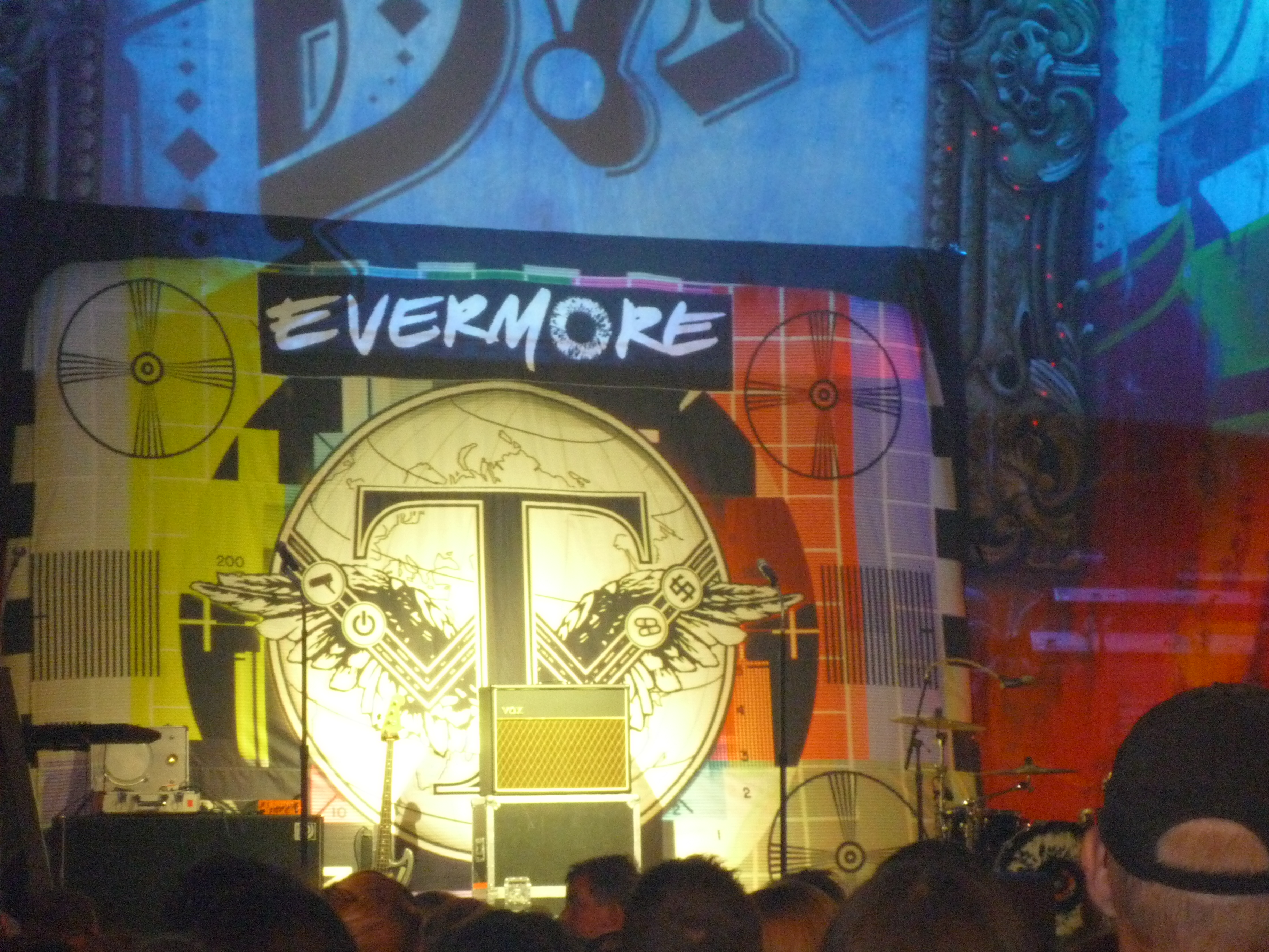 Evermore in Freiburg als Vorband für P!nk im Rahmen der Funhouse-Tour